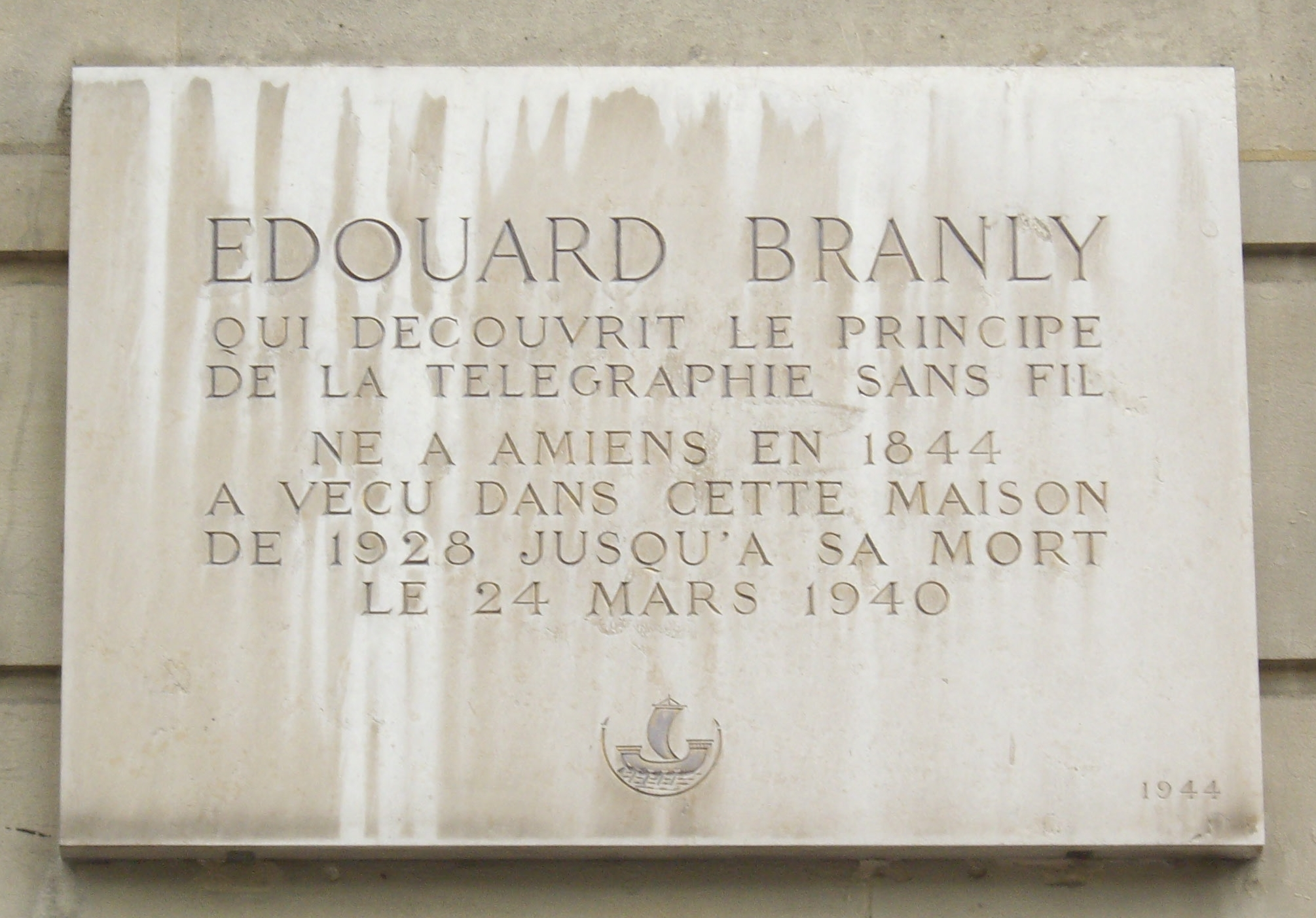 Plaque apposée au n° 87 du boulevard Saint-Michel, Paris 5e, où vécut le physicien et médecin Édouard Branly (1844-1944) de 1928 à sa mort le 24 mars 1940.